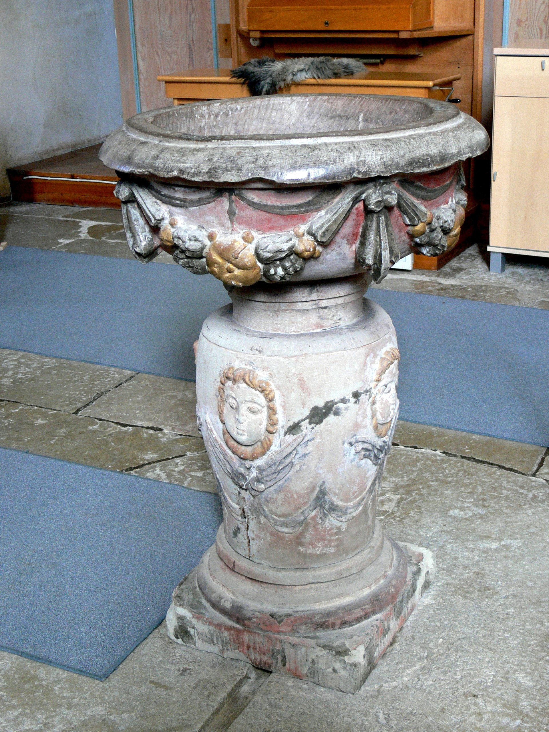 Lärbro kyrka auf Gotland. Barocker Taufstein